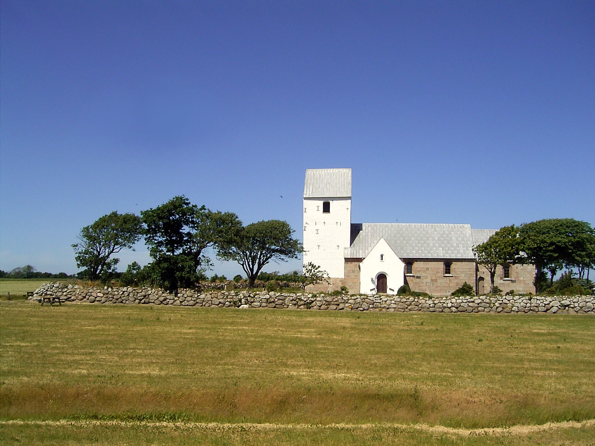 Aggersborg Kirke in Denmark